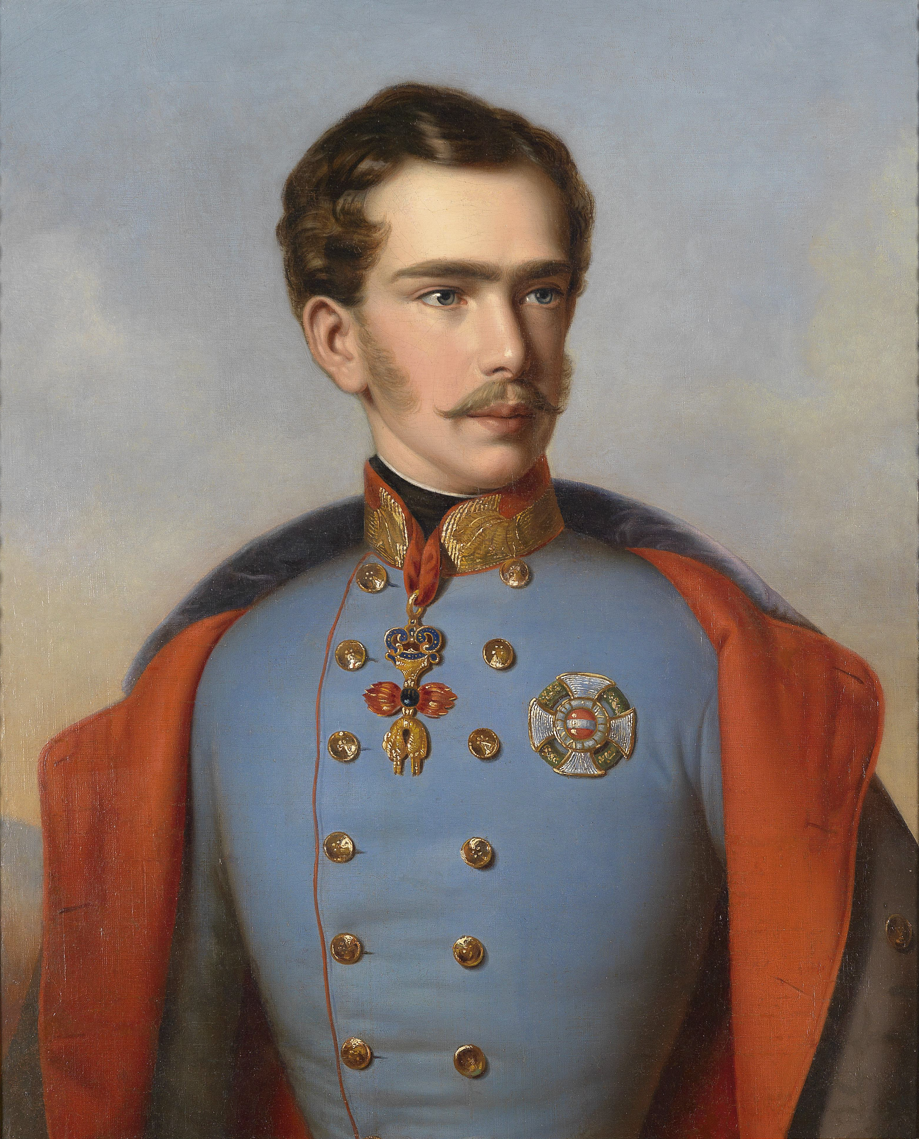 Porträt des jungen Kaisers in Uniform, dekoriert mit dem Orden vom goldenen Vlies und dem Militär Maria Thereien Orden